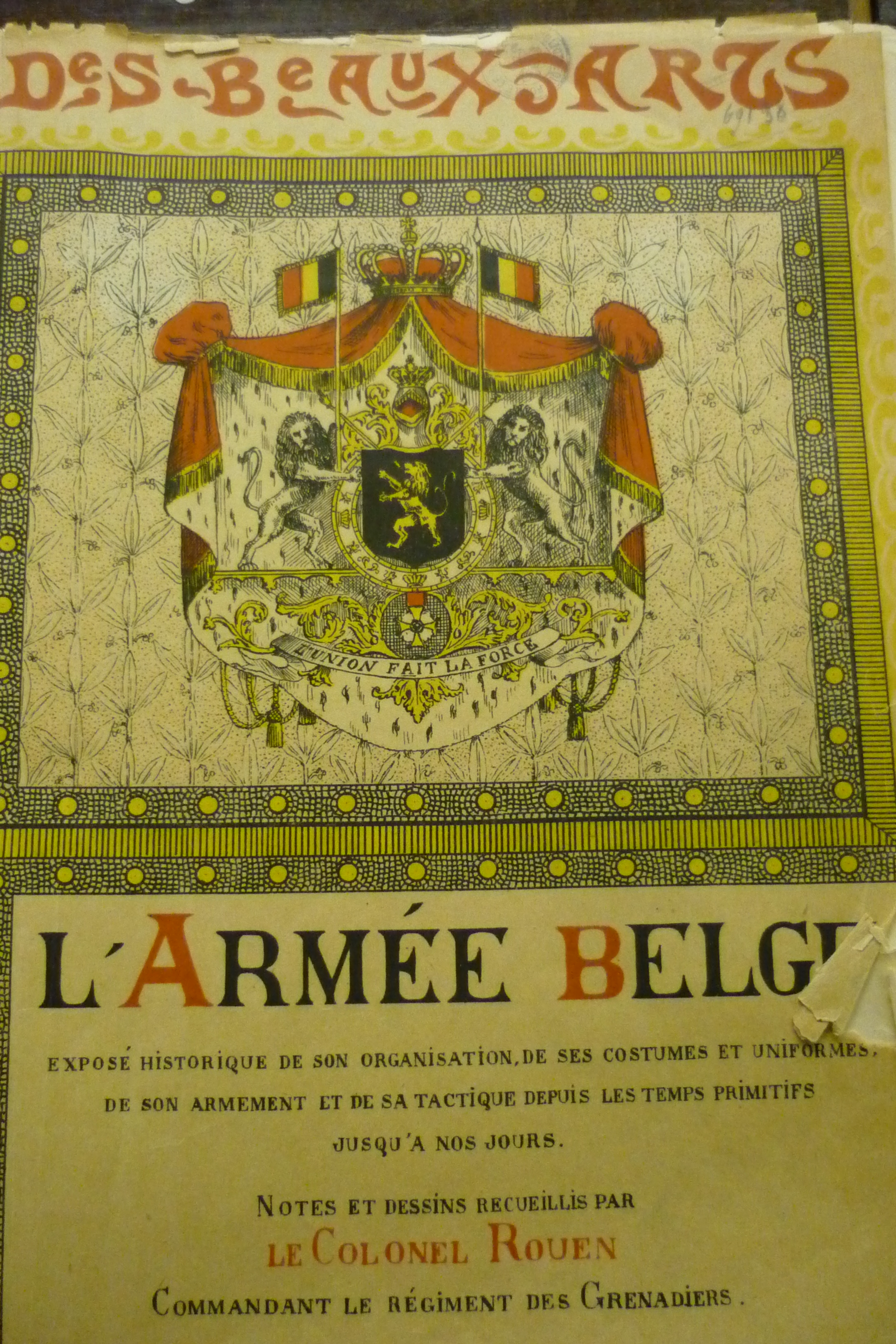 Frontispice du livre du général Rouen, l'Armée Belge, Bruxelles, 1896.